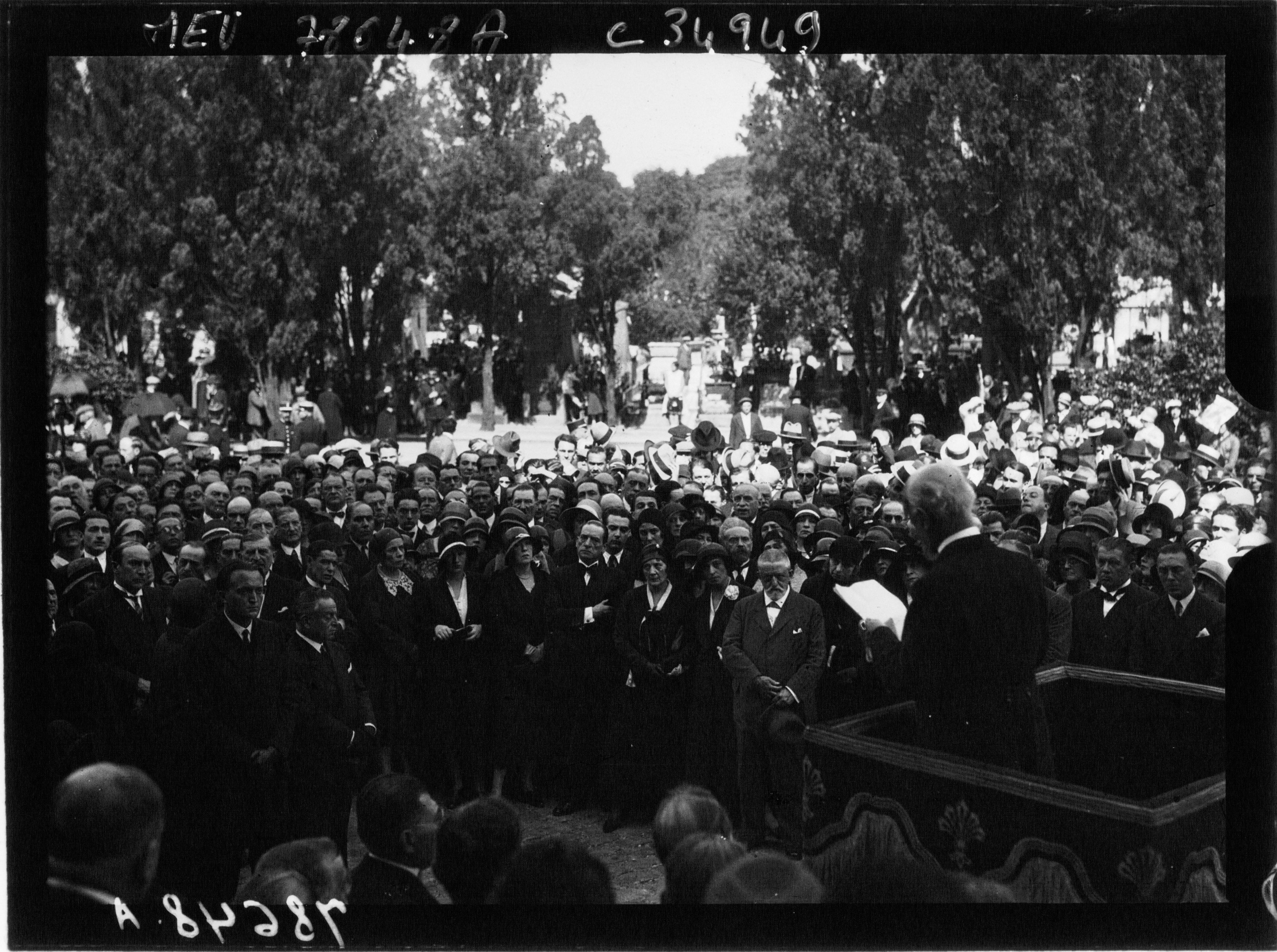 Père Lachaise : obsèques de Silvain : les discours